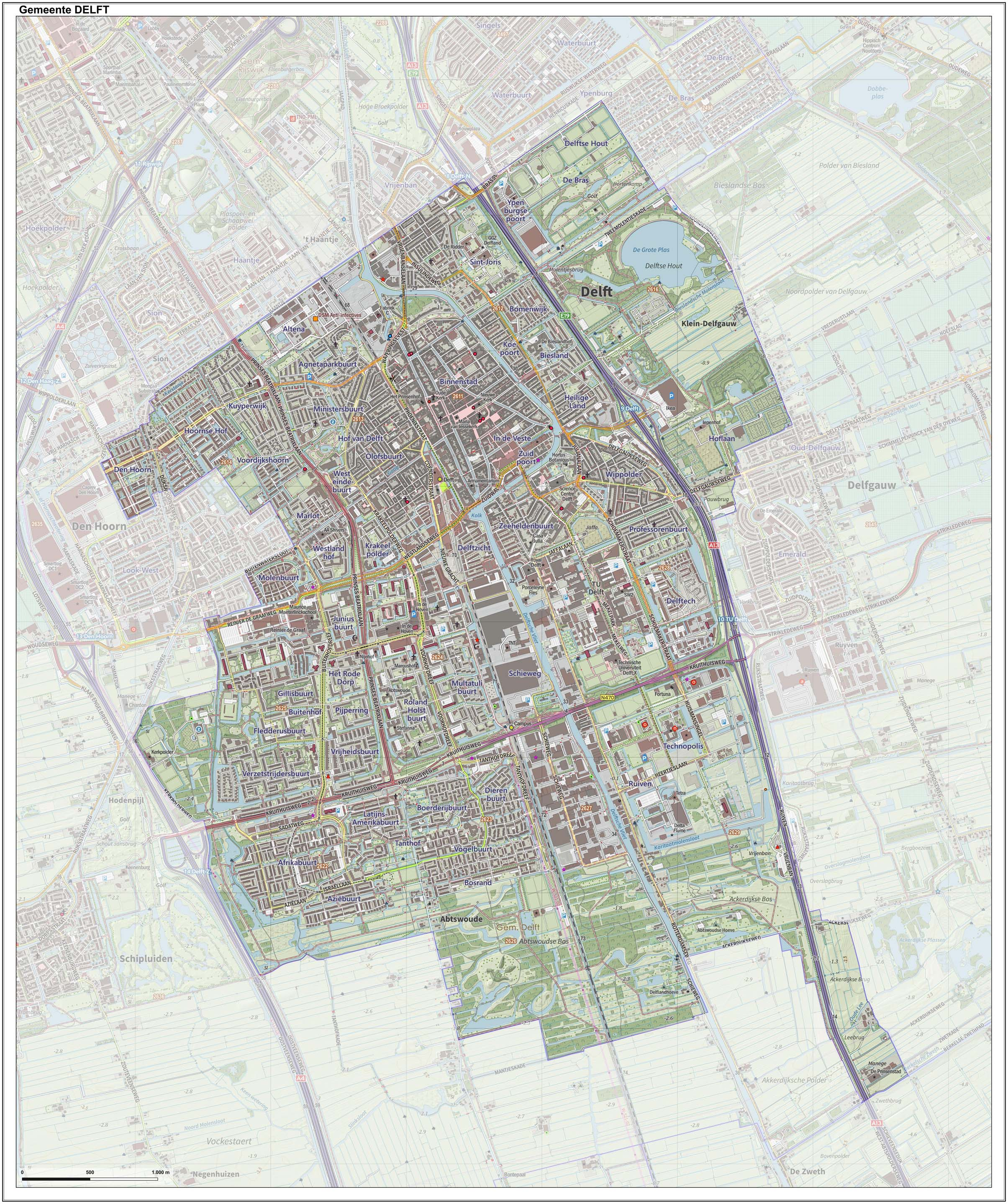 Topografische gemeentekaart. Resolutie: 400 pixels/km. Kaartbeeld samengesteld uit de open geodata van de Top10NL en Top25namen (Kadaster), Creative Commons-BY licentie. Gebouwvlakken uit open geodata BAG extract. Wegen uit de OpenStreetMap, OpenStreetMap community. Reliëfschaduw uit de Actuele Hoogtekaart AHN2. Samenstelling en kleurenschema: Jan-Willem van Aalst, met QGIS. Zie ook de Legenda.